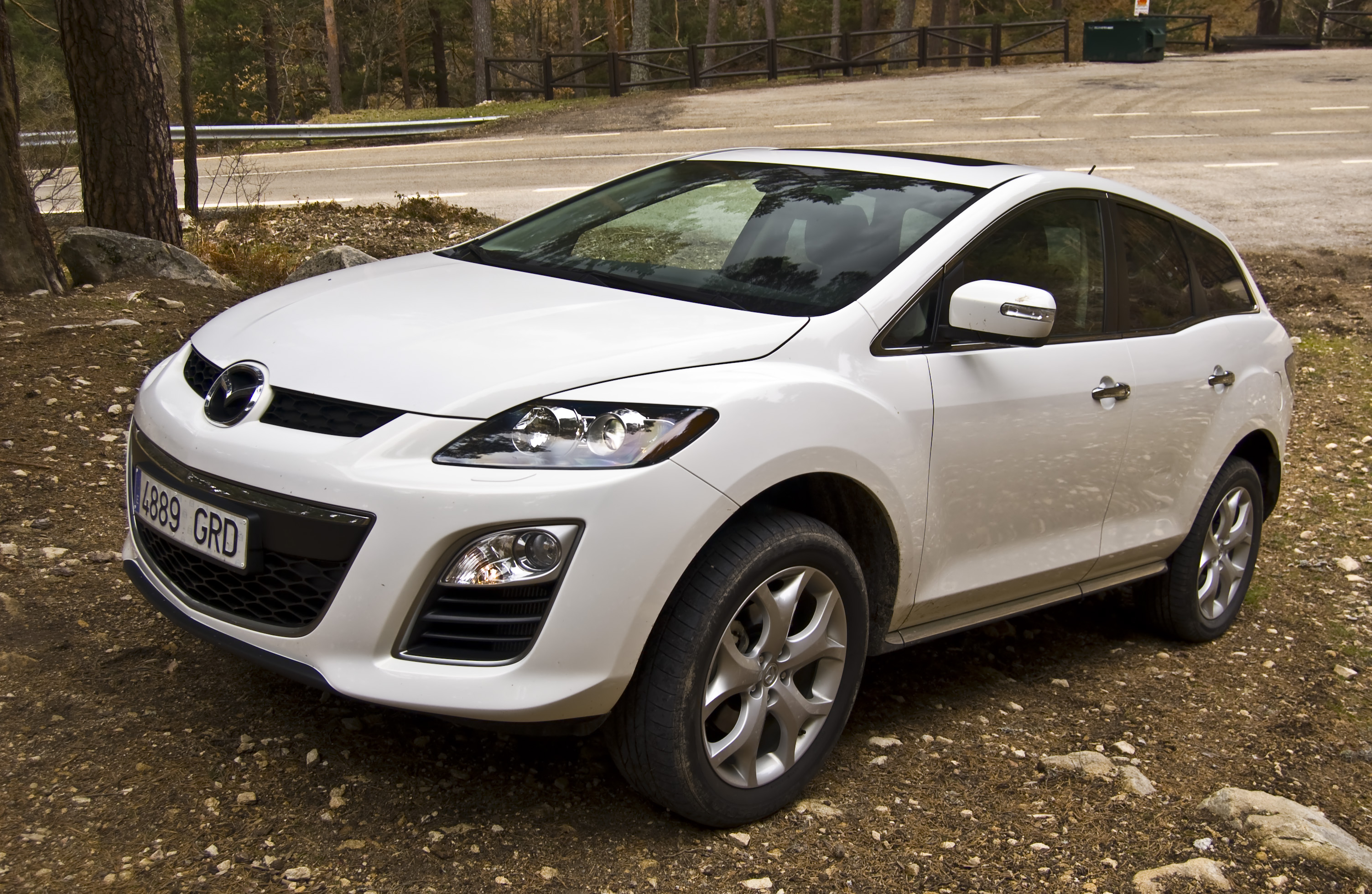 Prueba del Mazda CX-7 para Diariomotor